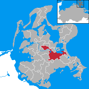 Bergen auf Rügen, Landkreis Rügen, Mecklenburg-Vorpommern